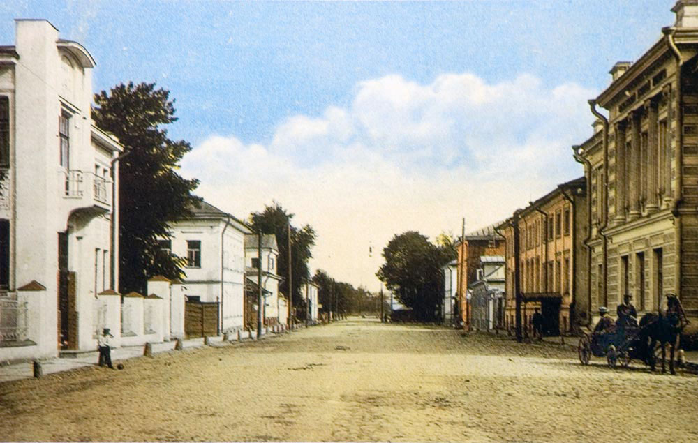 Старый Ярославль. Дворянская улица. (Проспект Октября)